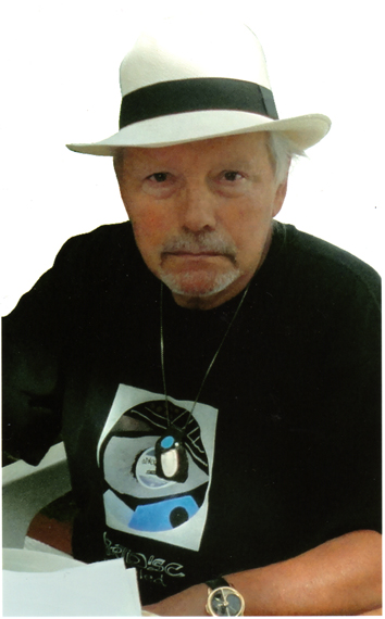 Sitges 2012